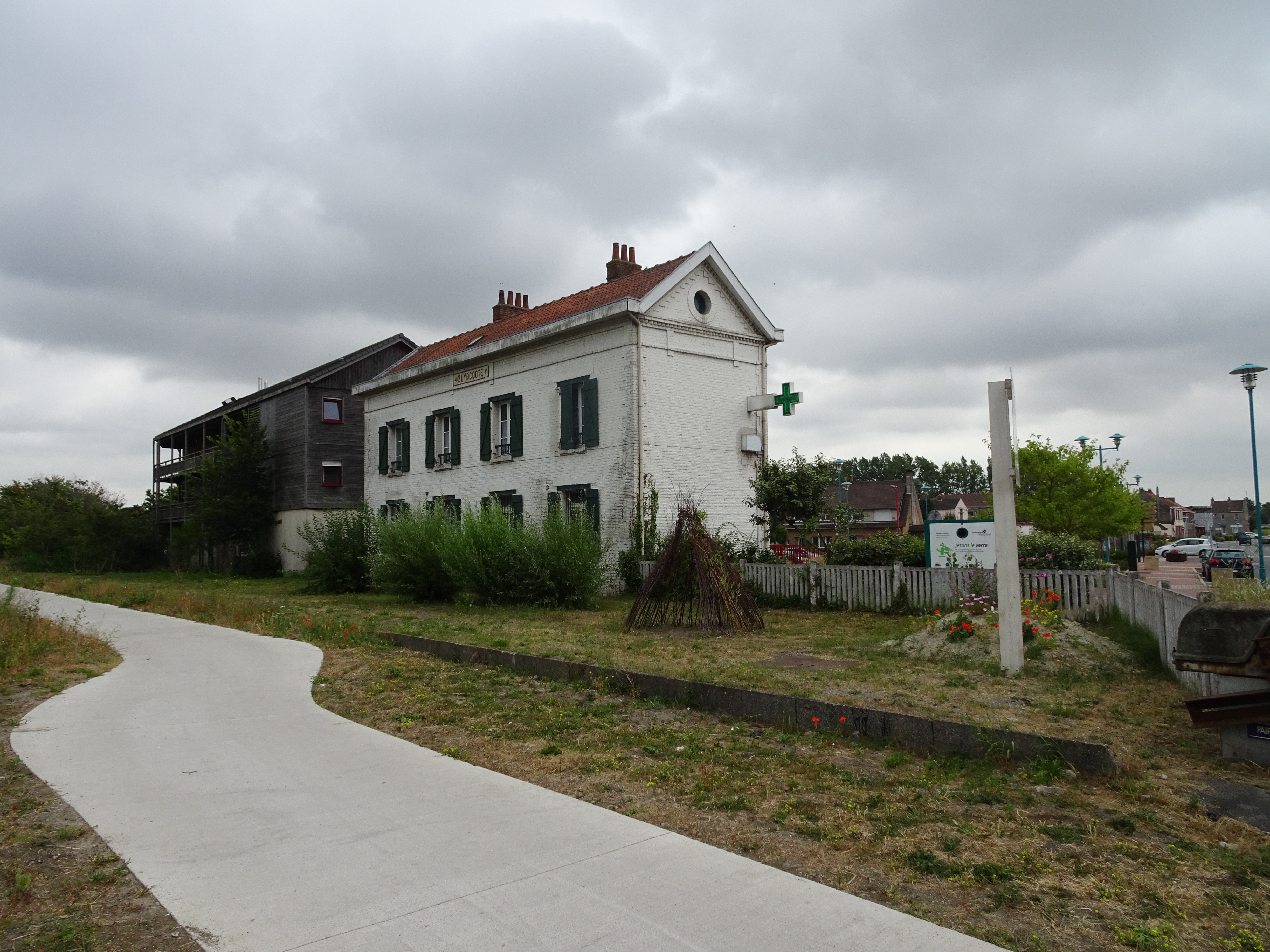 Zuydcoote (département du Nord, France) l'ancienne gare